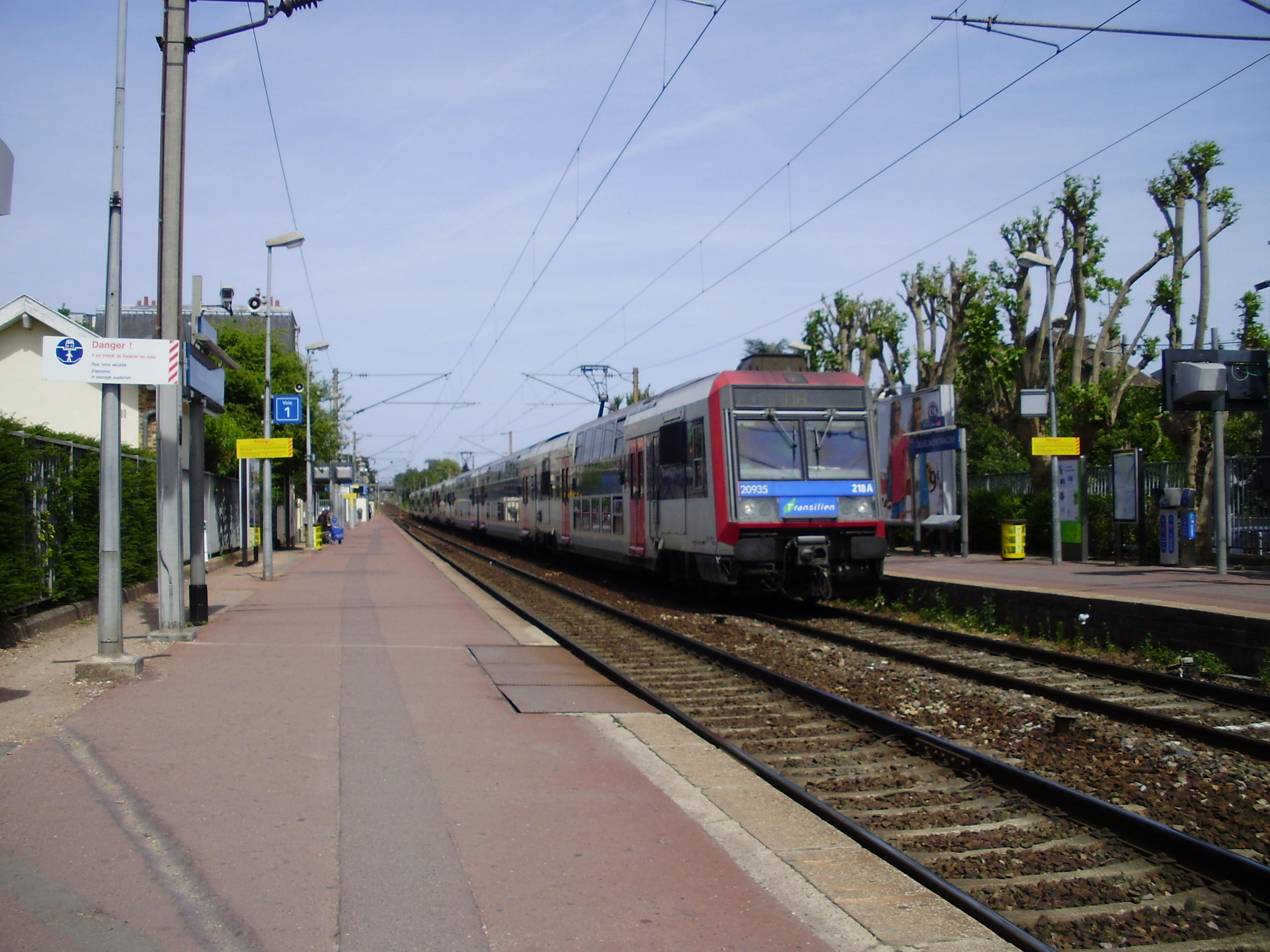 Gare de Deuil - Montmagny, à Deuil-la-Barre, Val-d'Oise, France : rame type Z 20900 prête à partir pour la gare de Paris-Nord